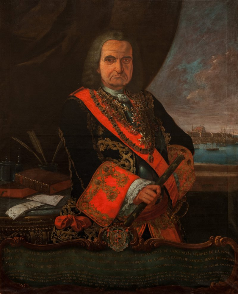 Retrato del aristócrata español Jaime de Guzmán-Dávalos y Spínola (1690-1767), marqués de la Mina, conde de Pezuela de las Torres, teniente general del ejército español, capitán general de Cataluña y caballero de la Orden del Toisón de Oro, de la Orden del Espíritu Santo, de la Orden de San Miguel, de la Orden de Calatrava y de la Orden de Montesa.